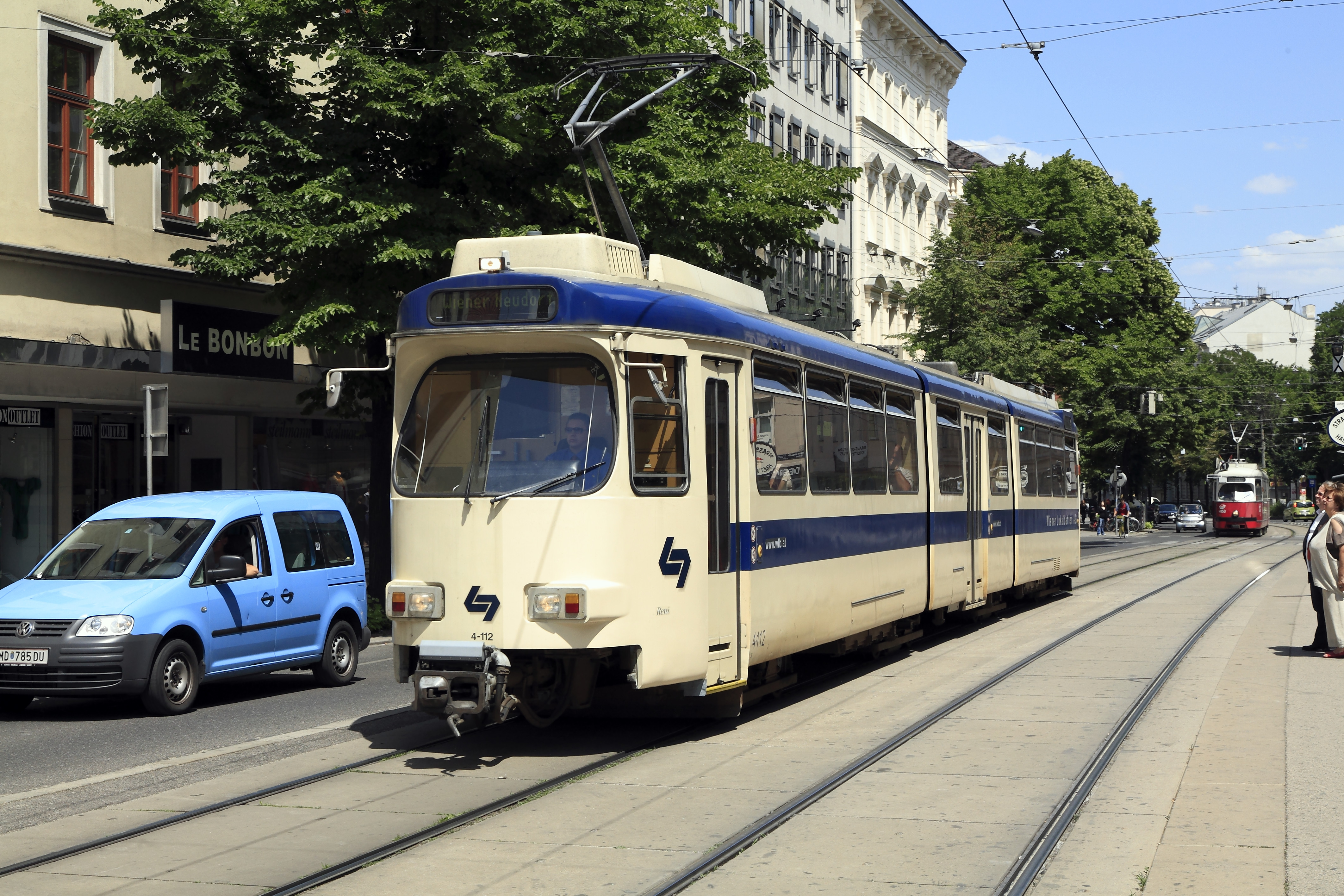 Lokalbahnzug nach Baden an der Haltestelle Johann-Strauß-Gasse, der letzten vor dem Ustrab-Tunnel unter dem Wiedner und Margarethengürtel. Der Anstrich dieses Wagens wurde an den der Niederflurwagen der Reihe 400 angepasst. Die Ziffer 4 vor der Wagennummer kennzeichnet die Wagen, bei denen die Vielfachsteuerung an die der Reihe 400 angepasst wurde.